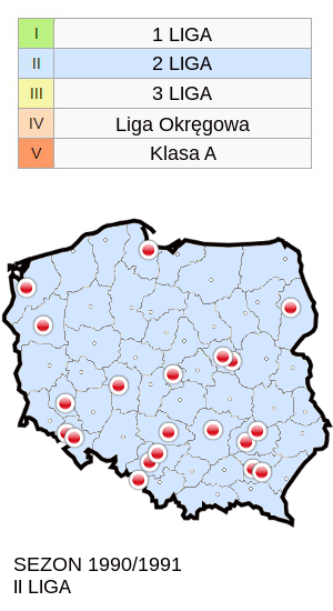 Jagiellonia w sezonie 1990/91 mapa